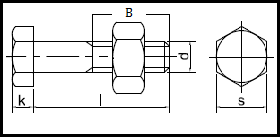 ISO 4016